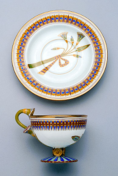 Tazziina con piattino del servizio per il Kedivè d'Egitto. Ginori a Doccia, 1874 c.